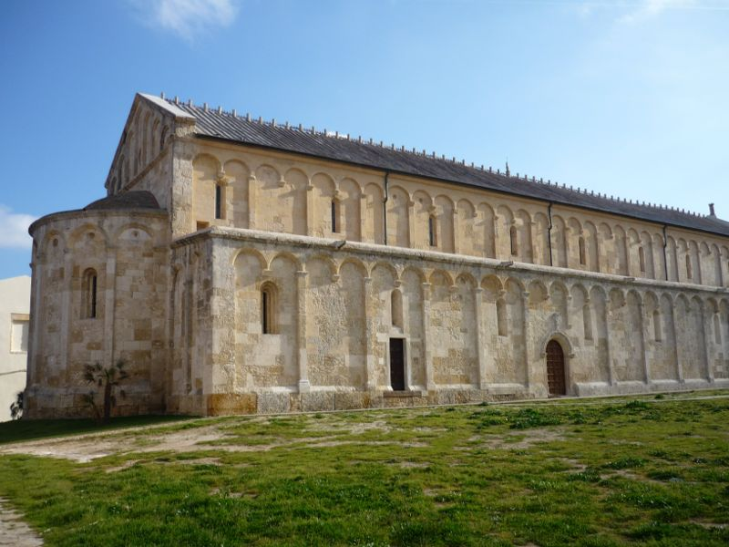 Porto torres basilica This is a photo of a monument which is part of cultural heritage of Italy. This monument needs check. The problem is the following: this monument has an incorrect ID (see the monument list). This monument needs check. The problem is the following: this monument is not listed in the monument list.